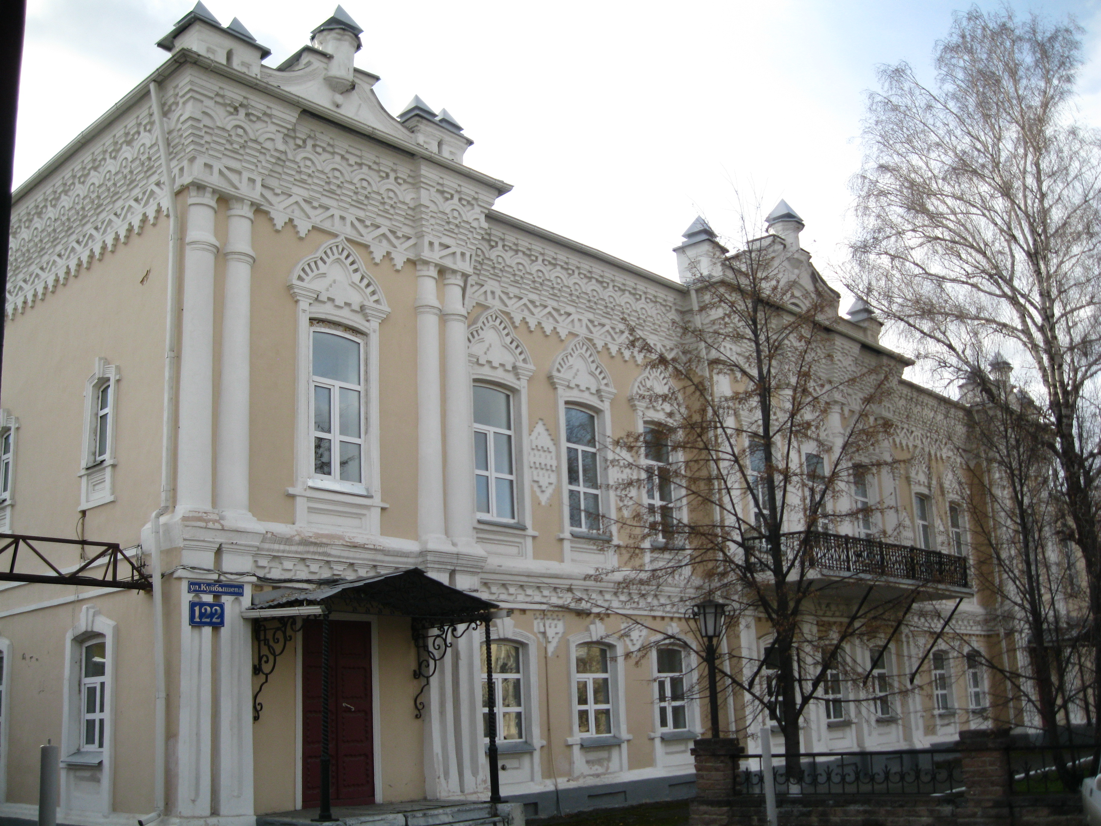 Дом купцов Смолиных в Кургане, Россия